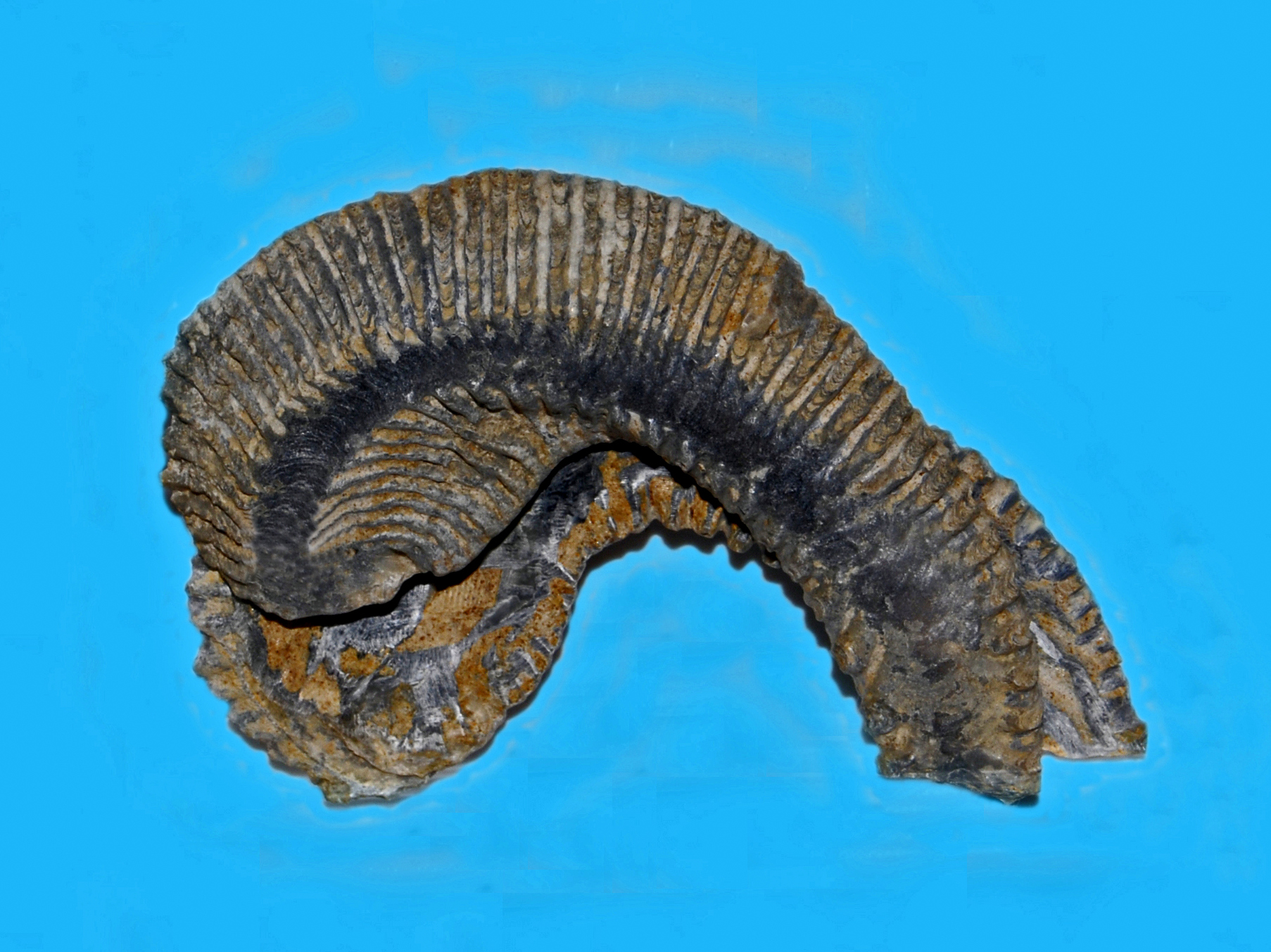 Fossil Agerostrea ungulata from Madagascar. Maastrichtian